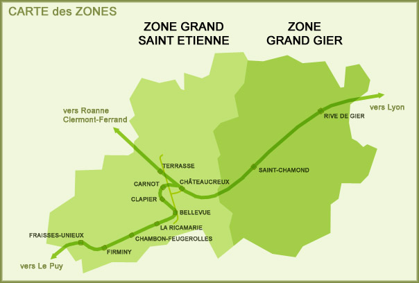 Carte des zones de la STAS